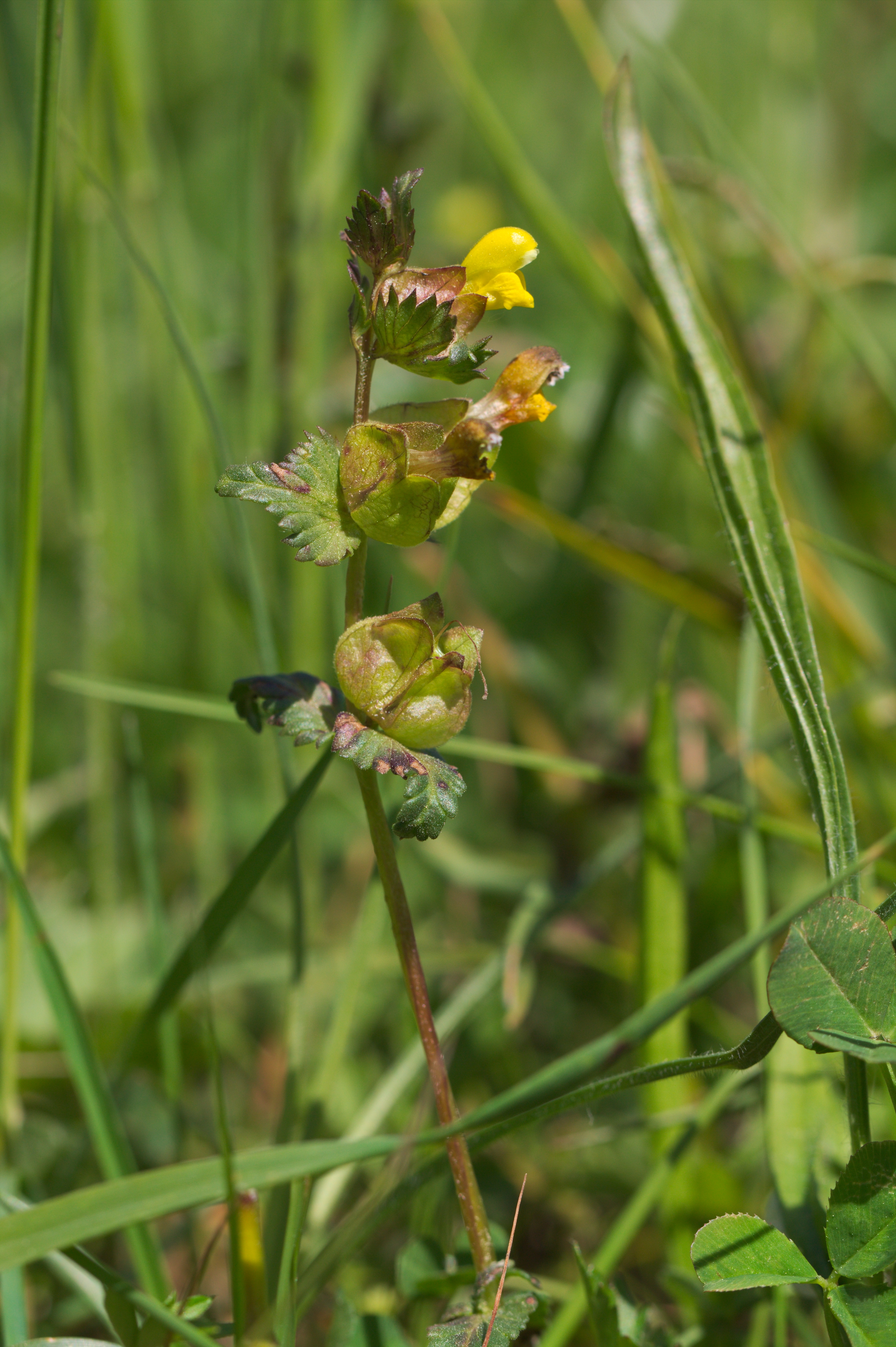 Matenský rybník (přírodní památka) - Rhinanthus major L., kokrhel větší - status ohrožení v ČR: není